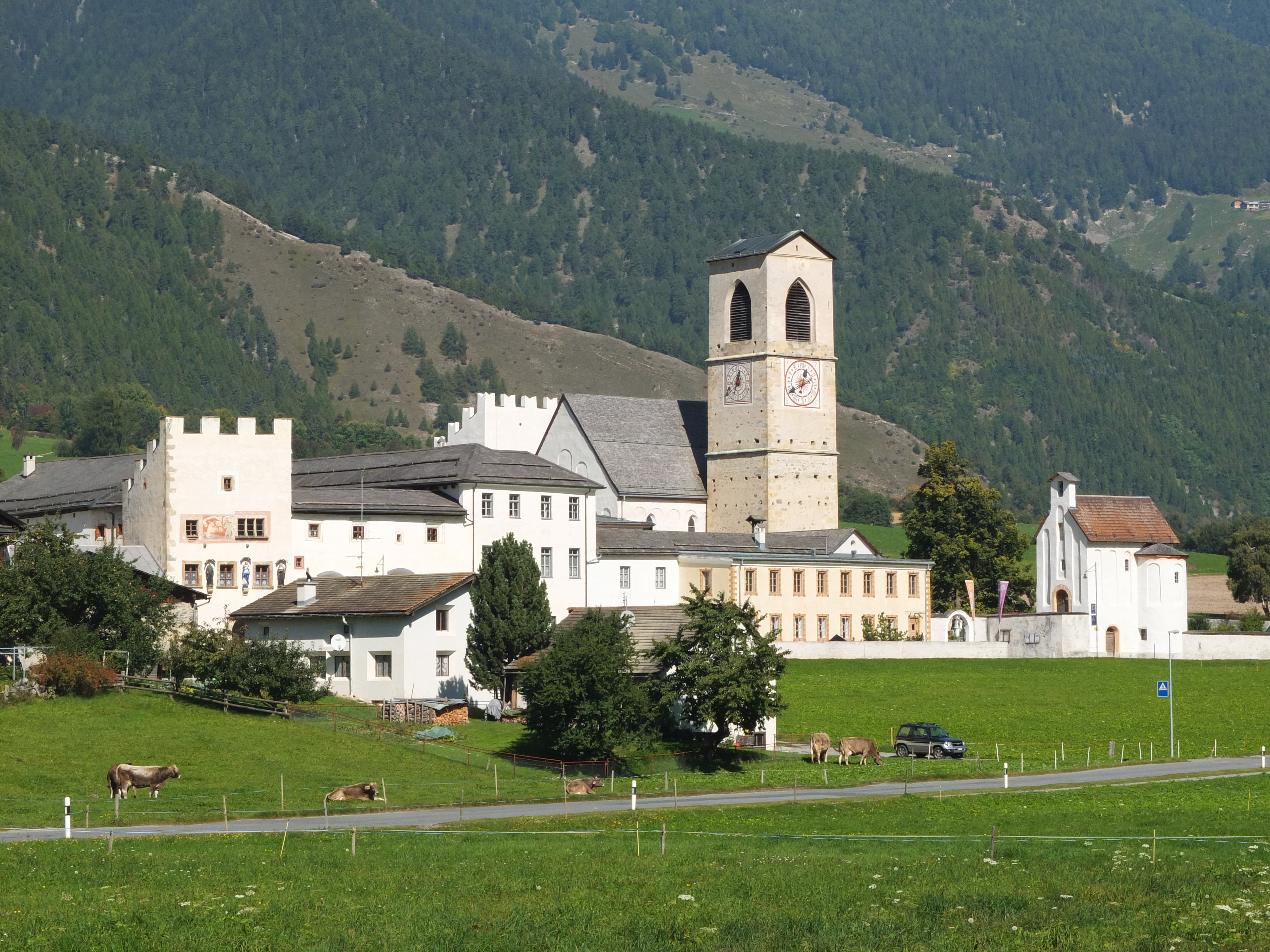 Benediktinerinnenkloster St. Johann, Gesamtansicht